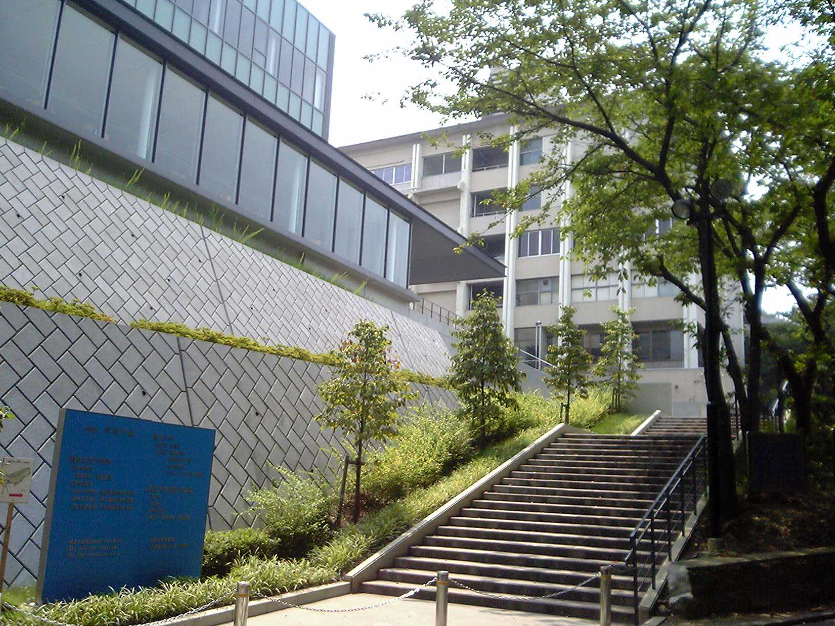 鶴見大学（2006年8月6日投稿者が撮影）